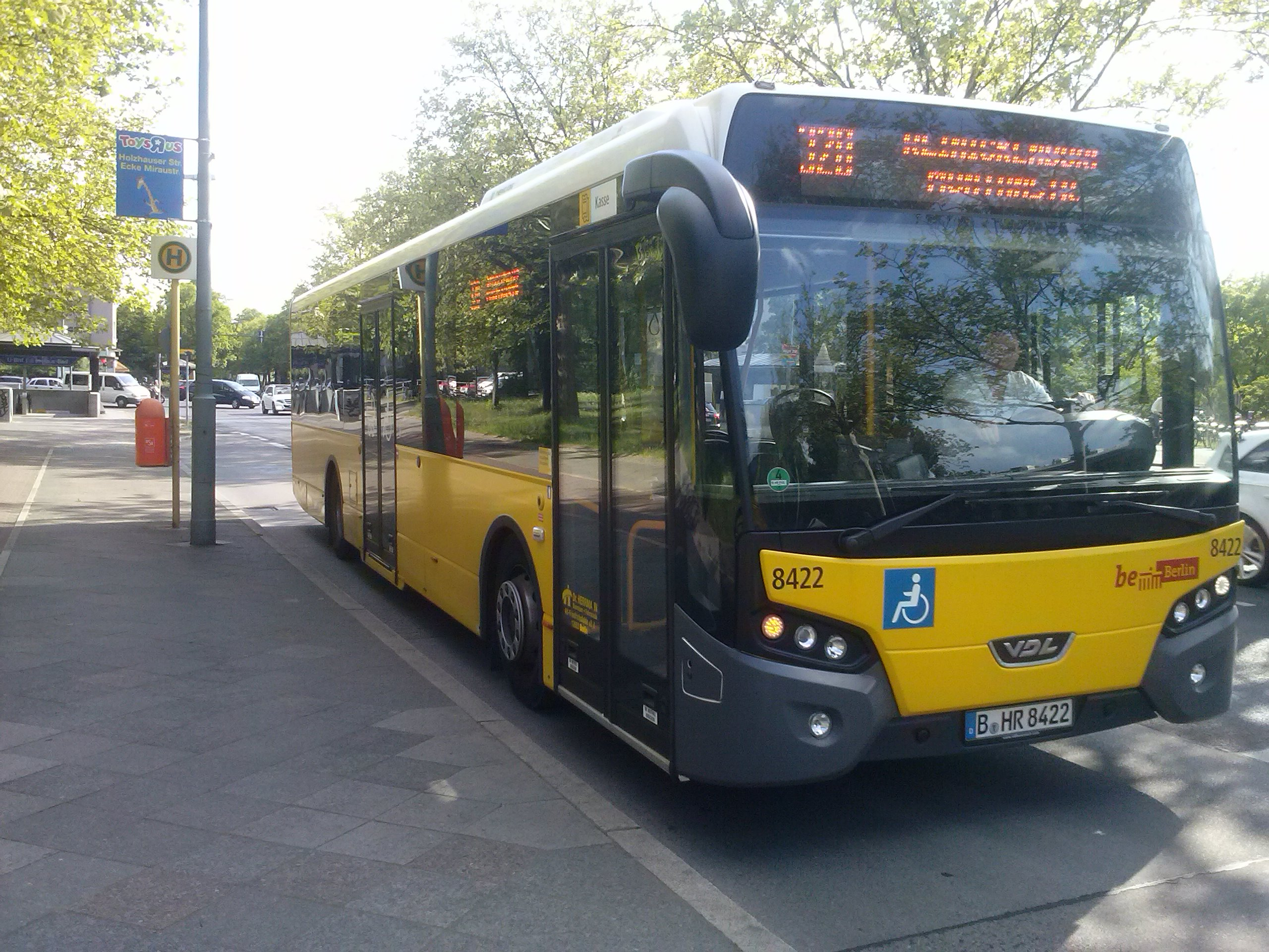 VDL EN von Dr Hermann